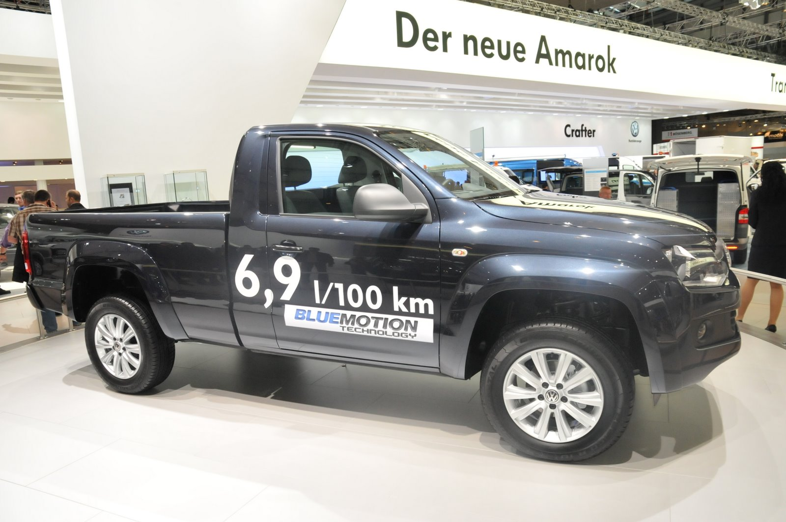 VW Amarok Single Cabin